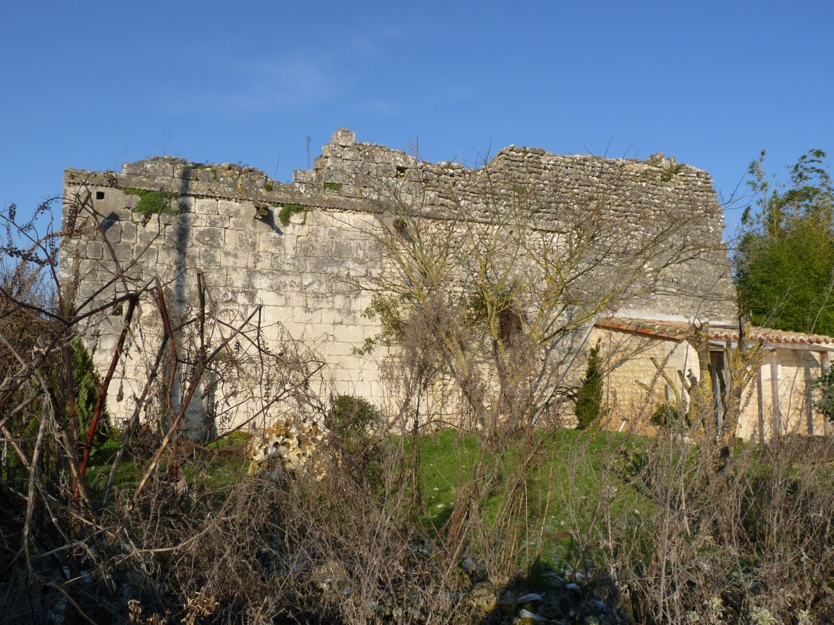 Vestiges de l'église de l'Houme, Fouquebrune, Charente, France. Vue du sud-ouest